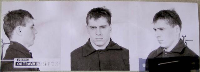 Ilustrační foto: z vězeňského spisu Vladimíra Hučína.